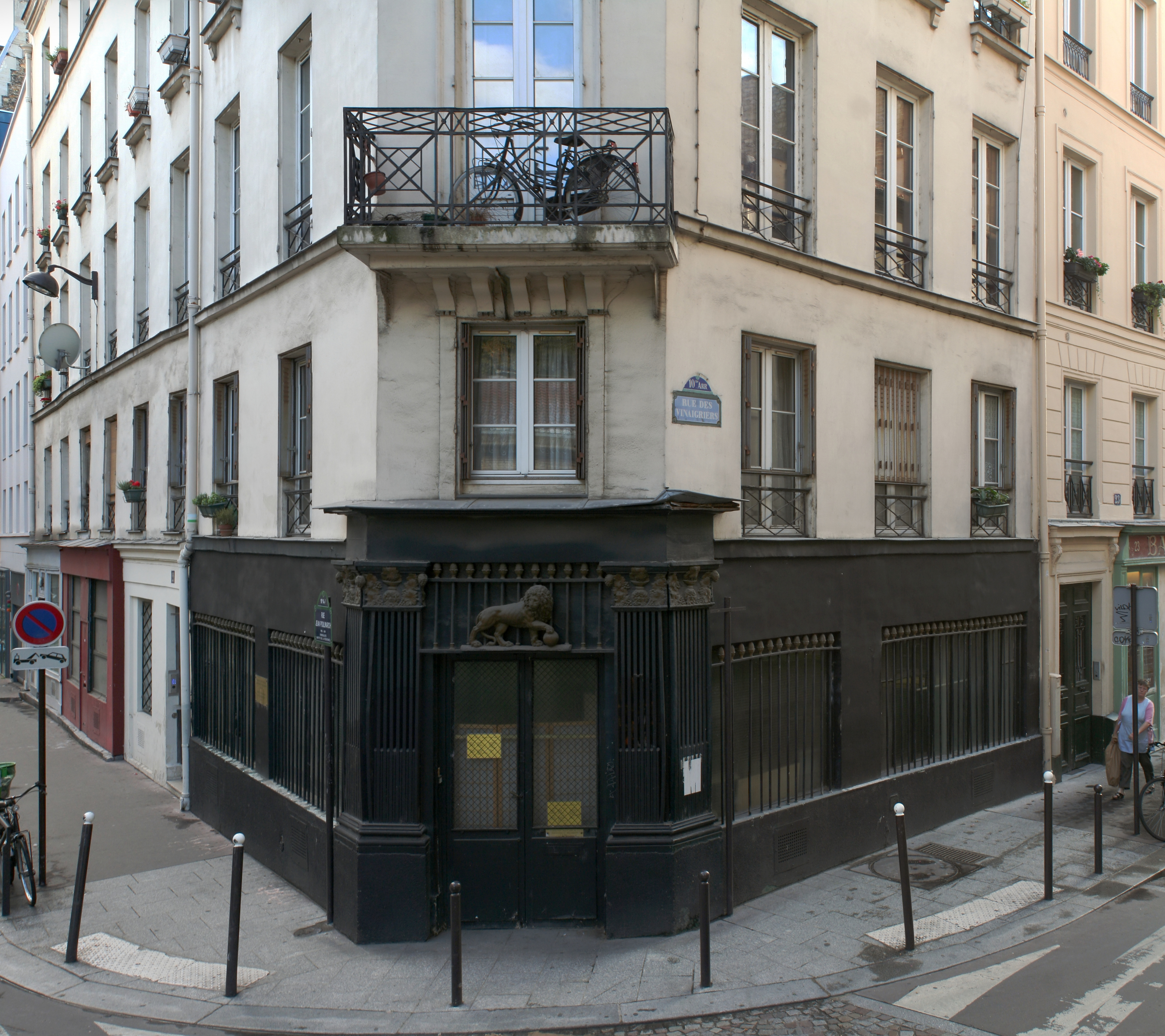 Immeuble d'angle 19-21 rue Jean-Poulmarch et rue des Vinaigriers. Au rez-de-chaussée : ancien débit de boisson, devanture inscrite au titre des monuments historiques.